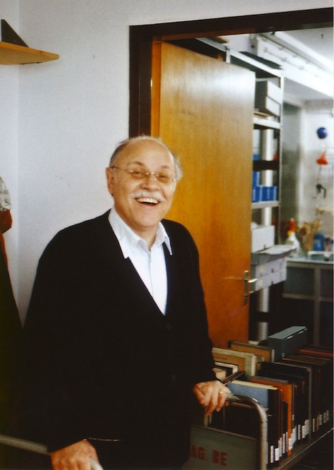 Leibl Rosenberg in der Stadtbibliothek Nürnberg, 2008